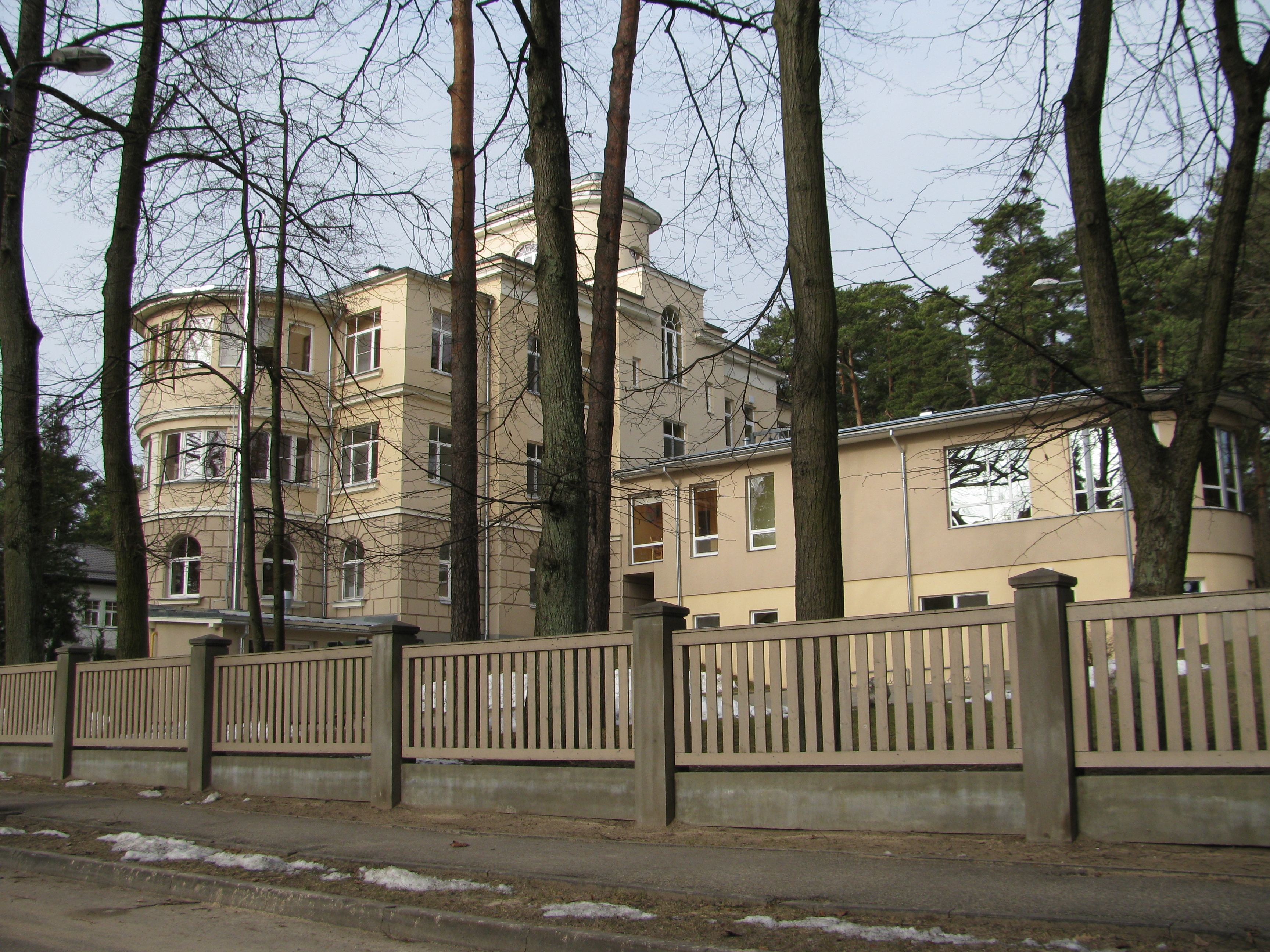 Savrupmāja, Ziemeļu rajons, Cimzes iela 3